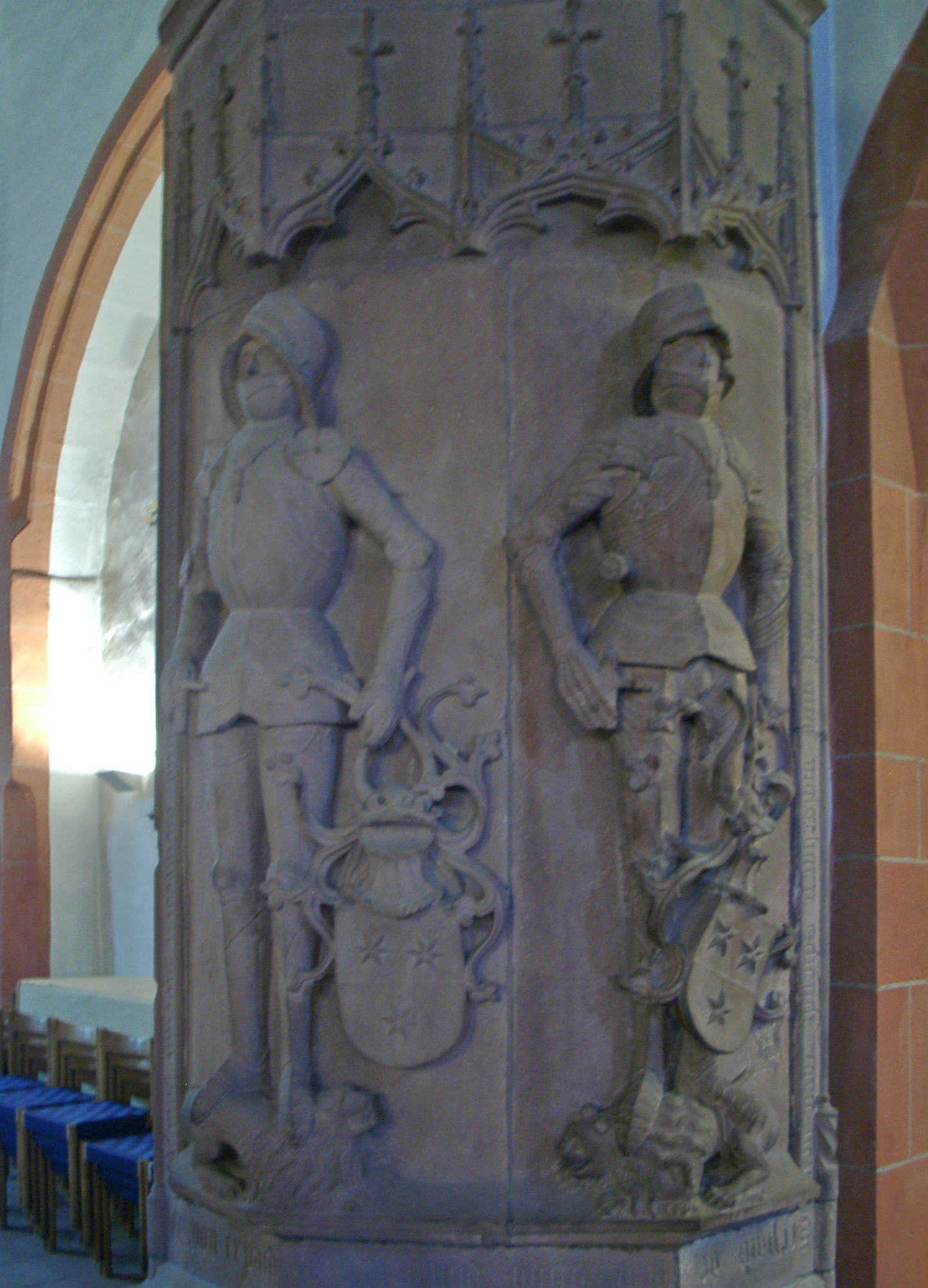 Michelstadt, Stadtkirche